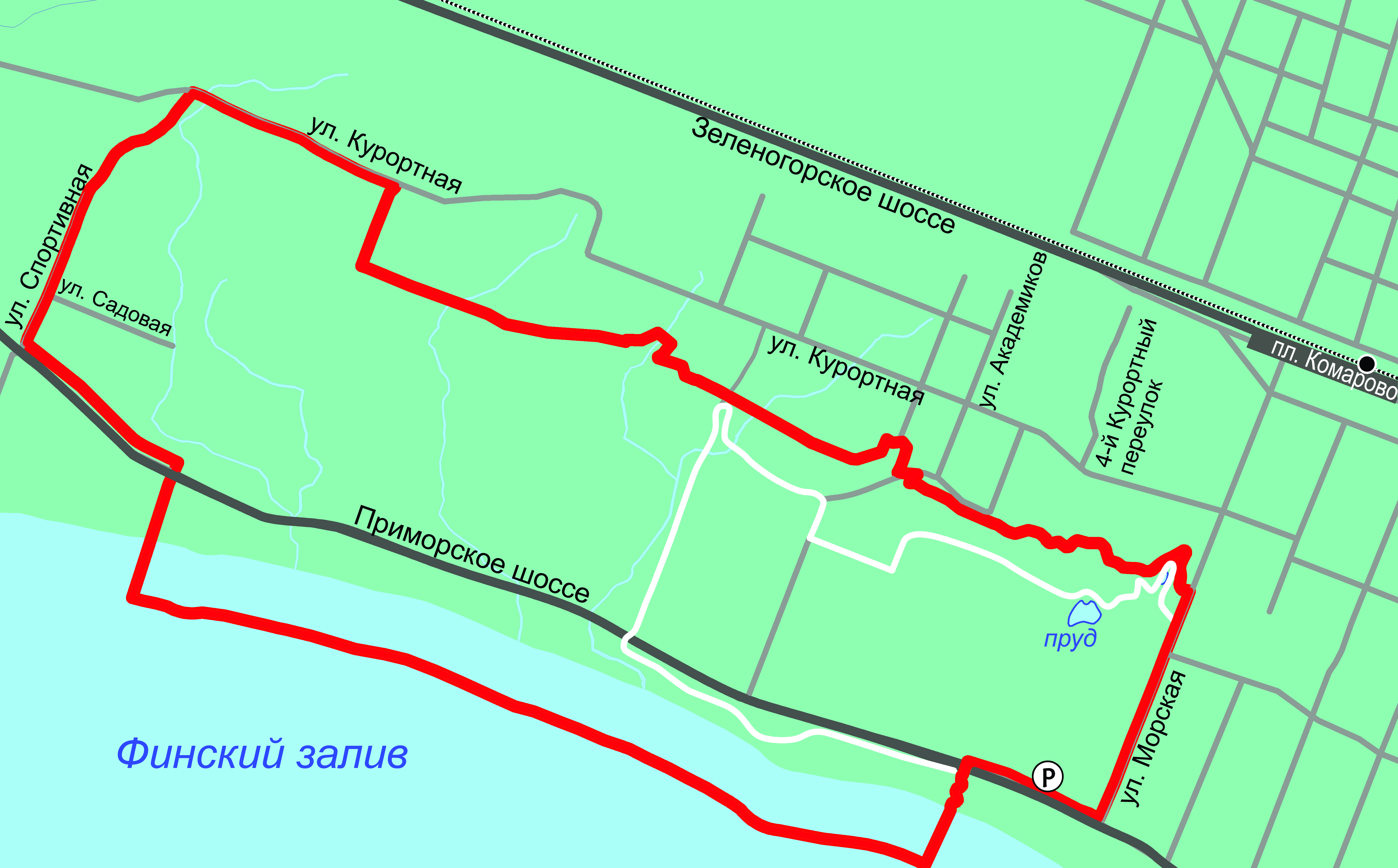 Памятник природы "Комаровский берег" (с экомаршрутом)